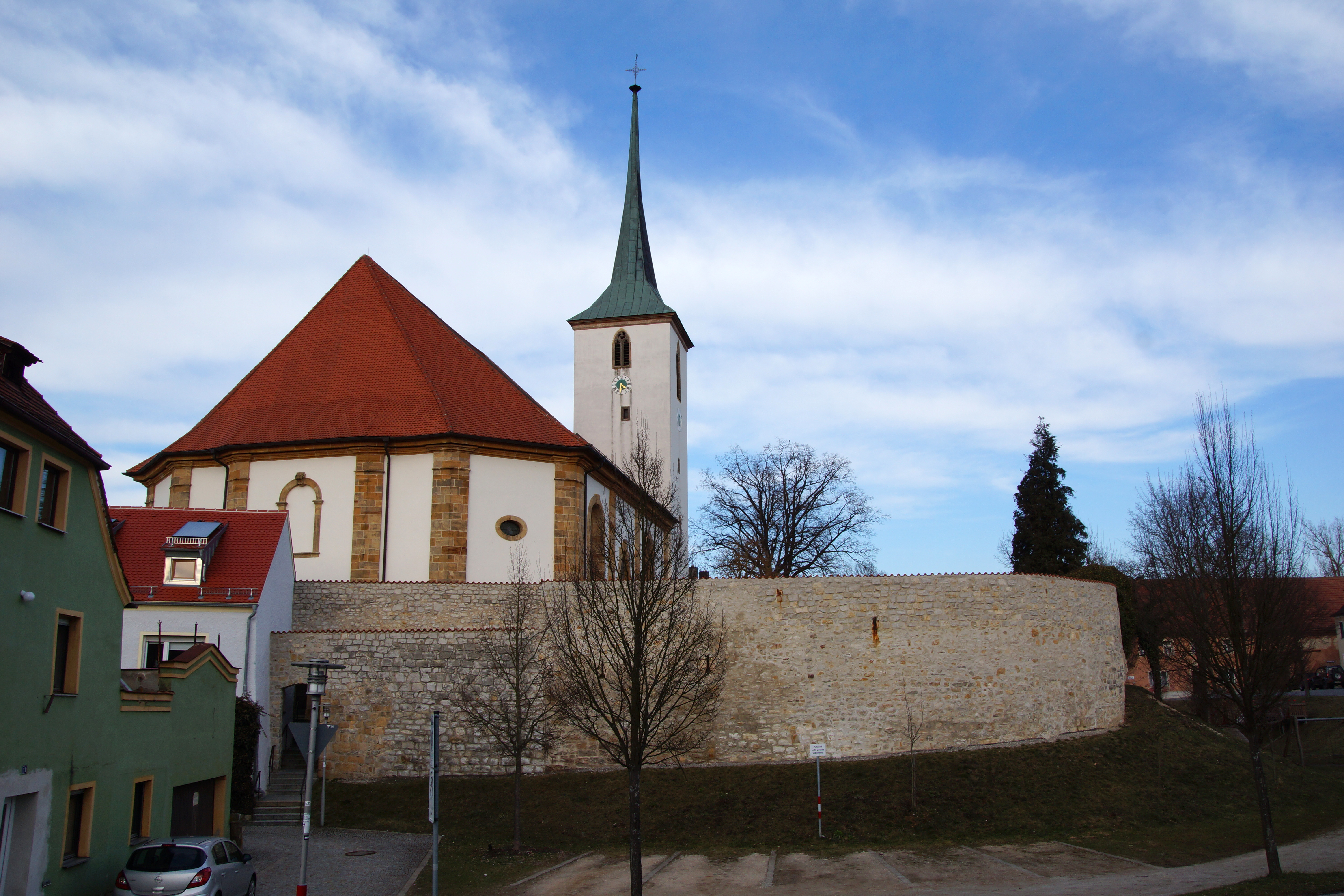 Die katholische Pfarrkirche St. Ägidius in Vilseck in der Oberpfalz